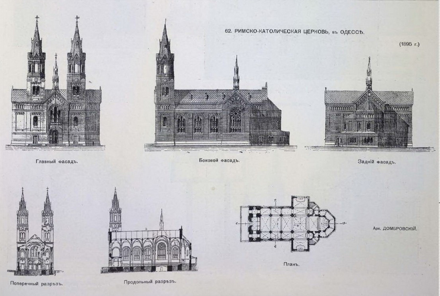 Проект римо-католицького костелу, г. Одеса, 1895 р. Ранішній проект Нового Католицького костелу у Одесі був використаний у проектуванні Миколаївського костелу.